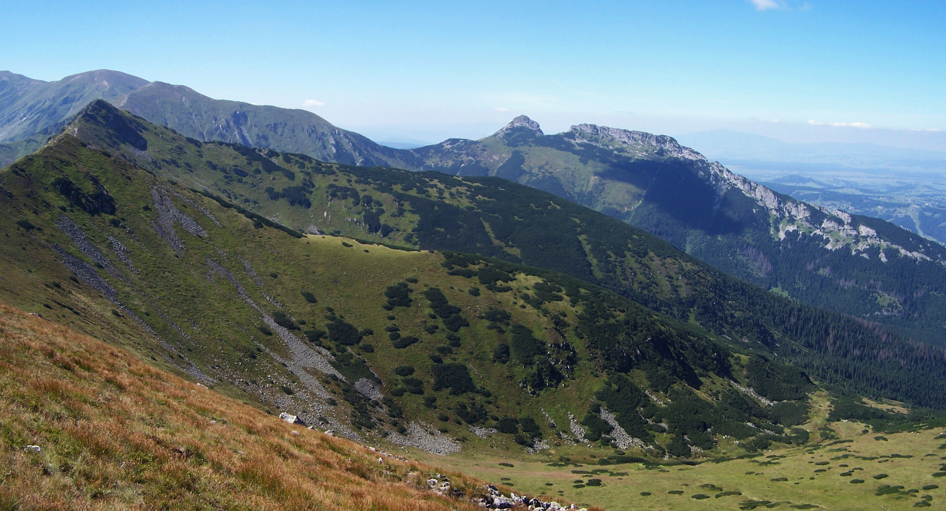 Widok z Kasprowego Wierchu na Dolinę Goryczkową i Kondratową